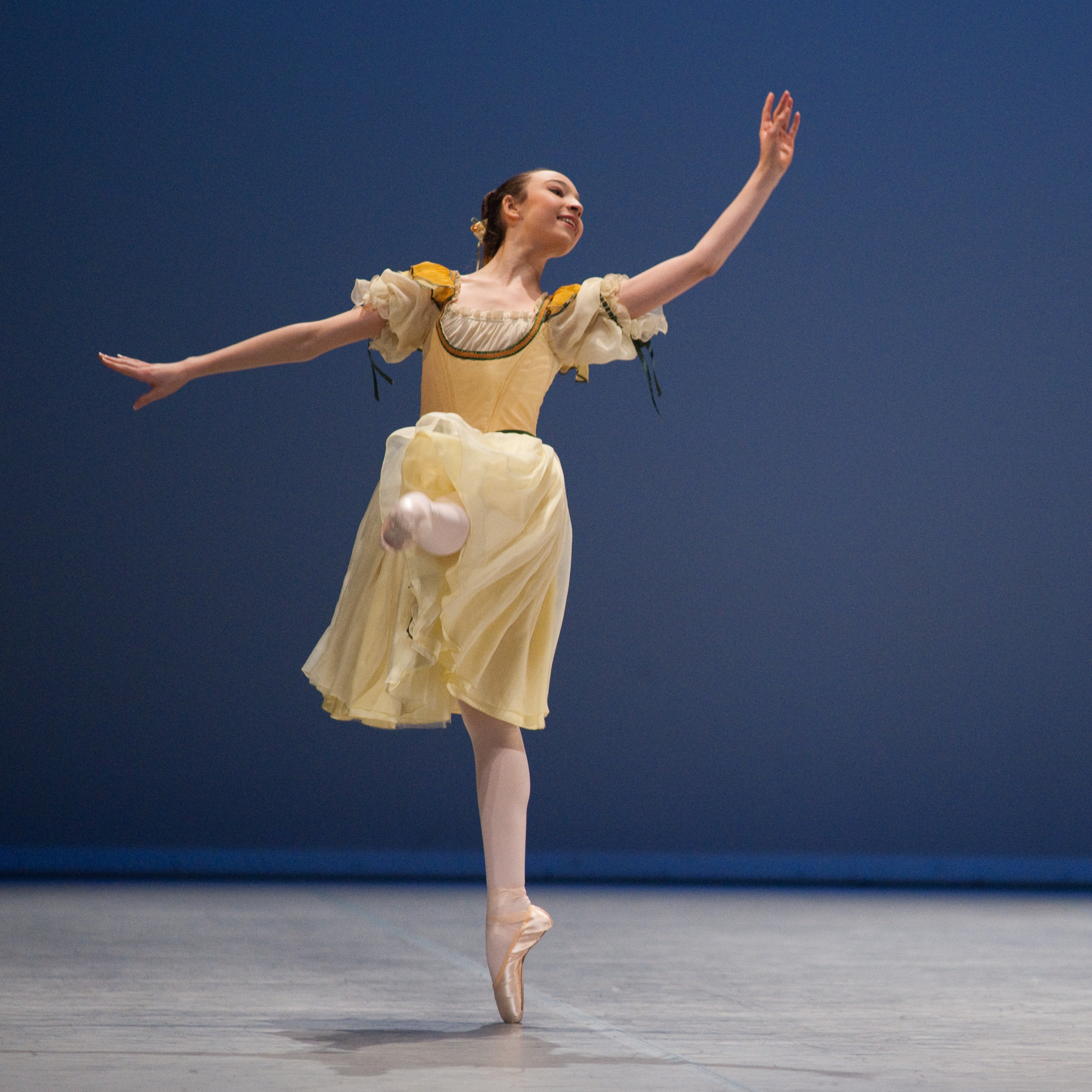 Variation extraite de Coppélia au Prix de Lausanne 2010.